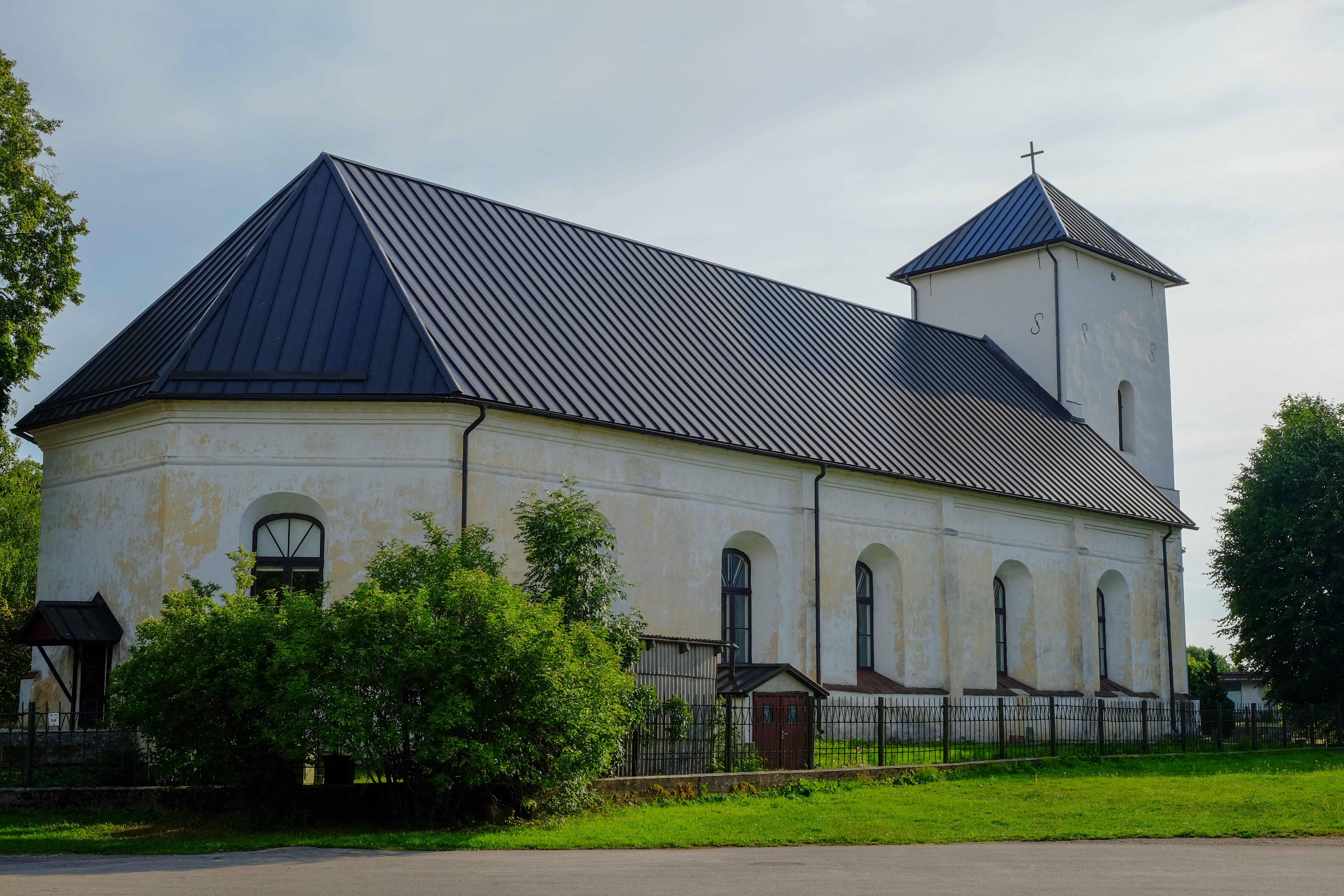 Grobiņas luterāņu baznīca